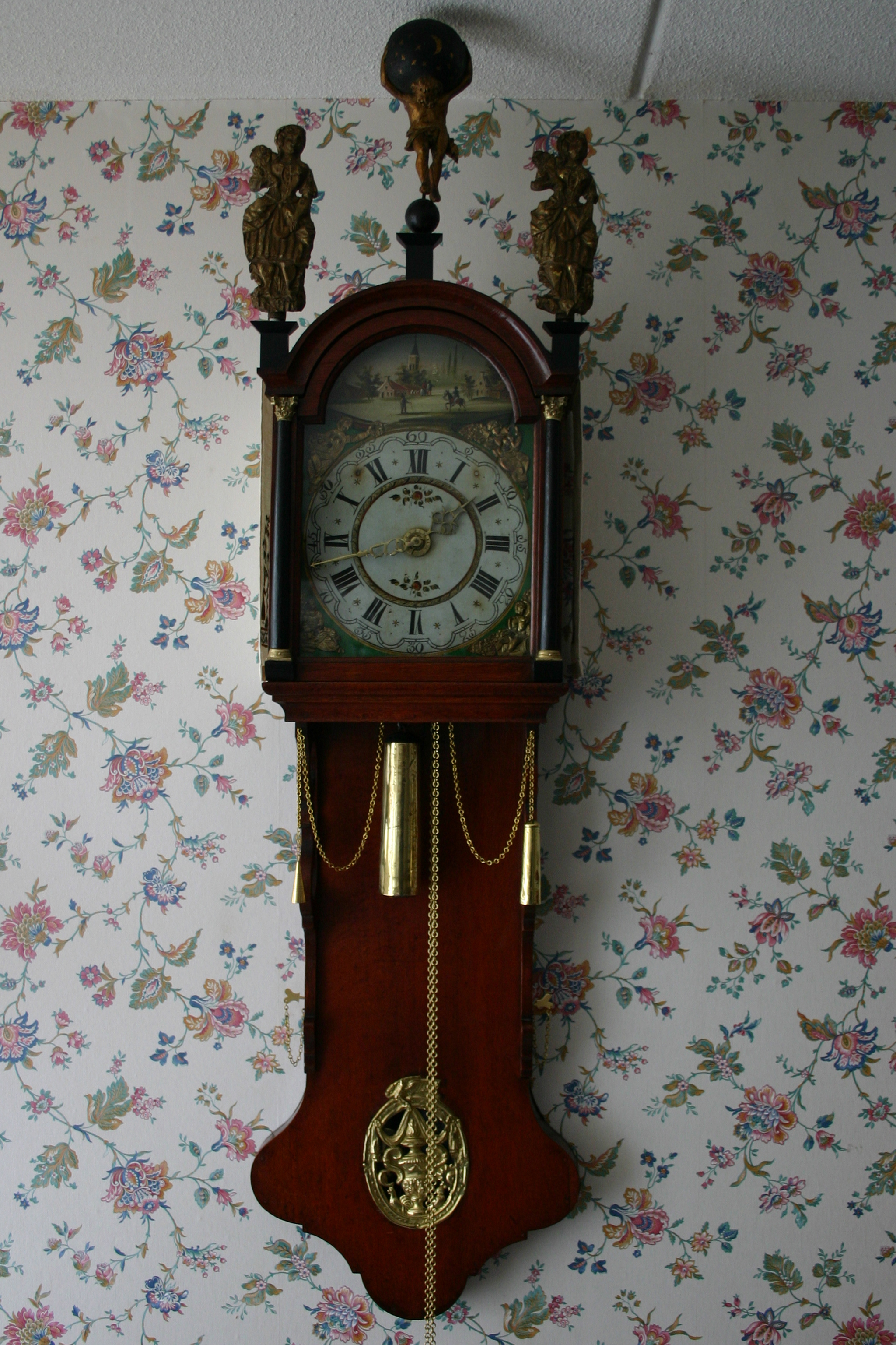 Friese Staartklok met op de kap twee Ceres beelden van latoen en een houten Atlasbeeld. Latoen vaas op de ruit in de onderkast.